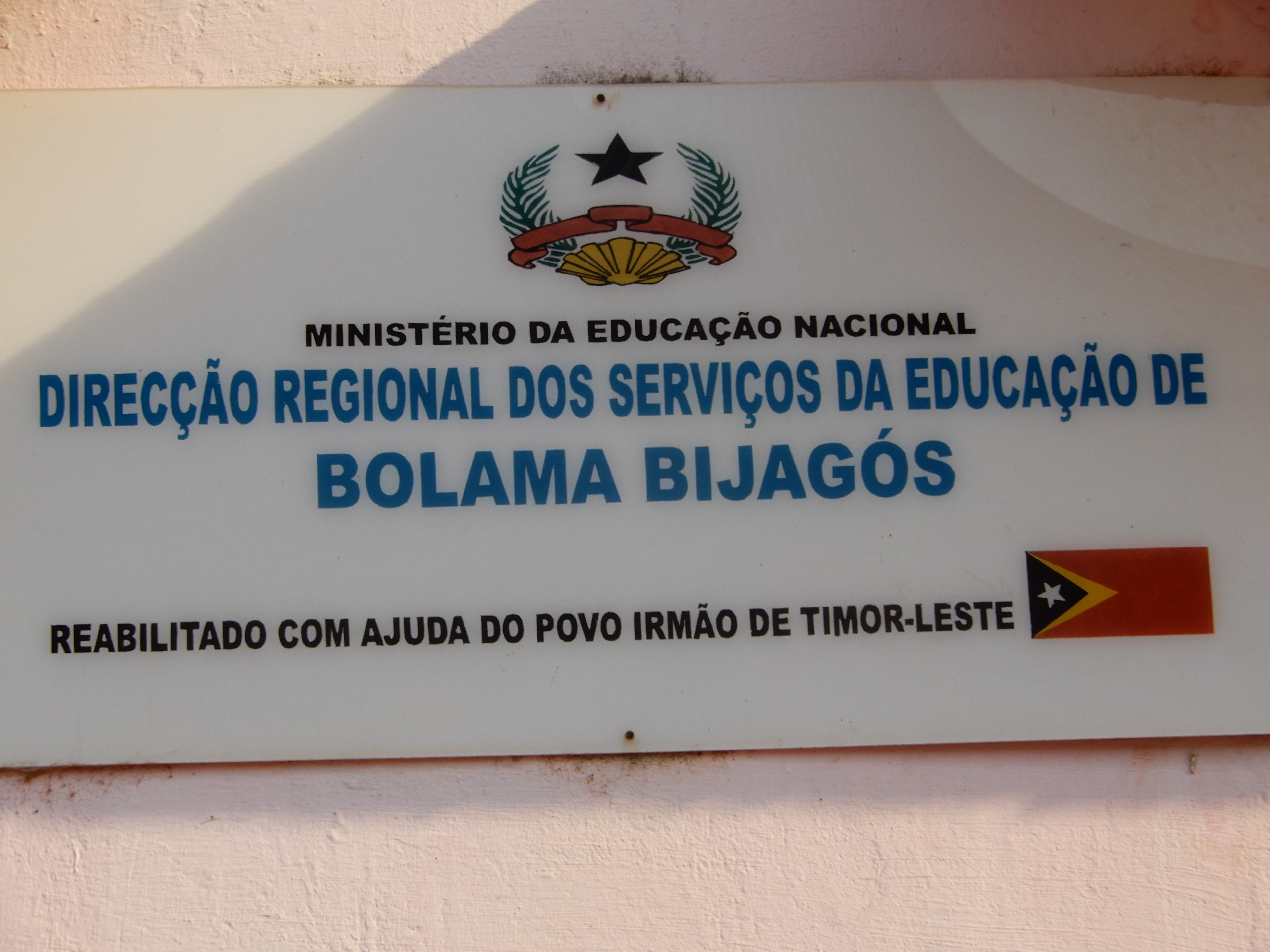 Direcção Regional dos Serviços de Educação de Bolama Bijagós, Bolama, Guiné-Bissau